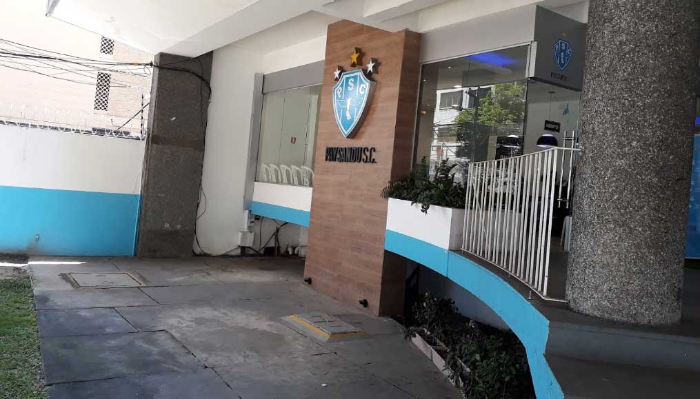 Frente da sede social paysandu, foto tirada 2017